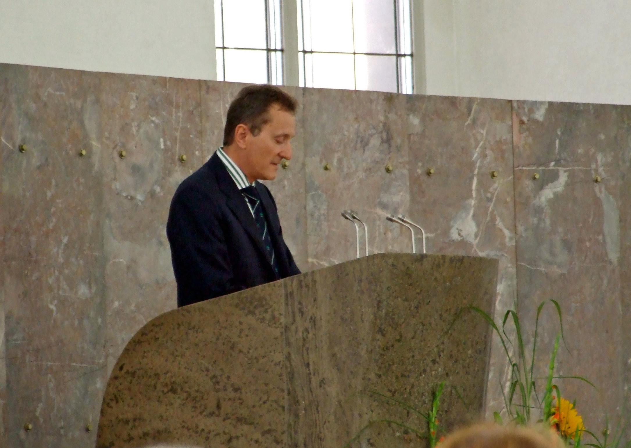 Begruessung durch den Vorsitzenden der Stiftung, 2007 in der Paulskirche in Ffm